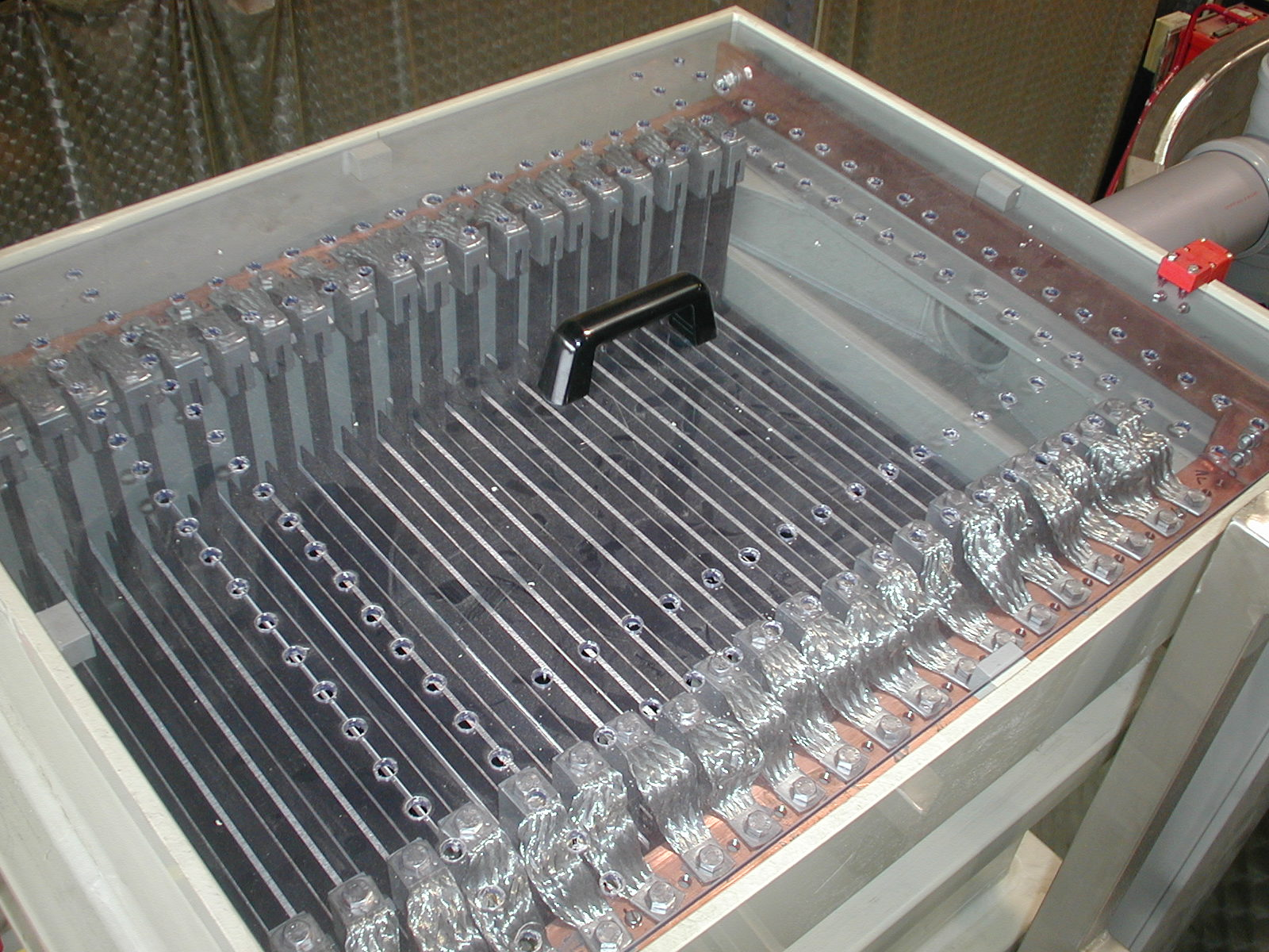 ELETTROFLOTTAZIONE esempio di cella Reattore, impianto di elettroflottazione per la DEPURAZIONE e RICIRCOLO acque REFLUE. Licensing Ticket#2007010810005681 Stefano S.